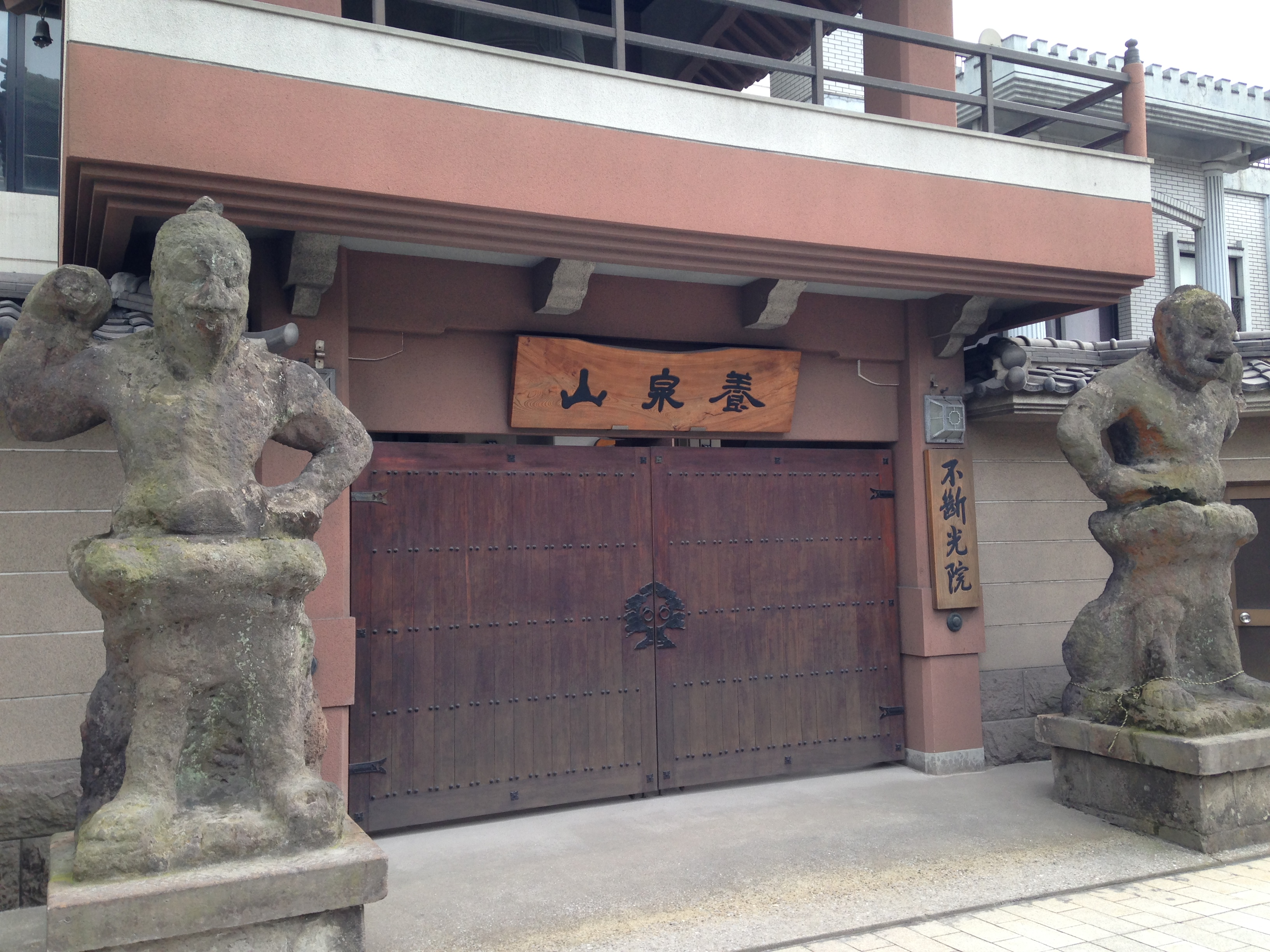 不断光院・正門